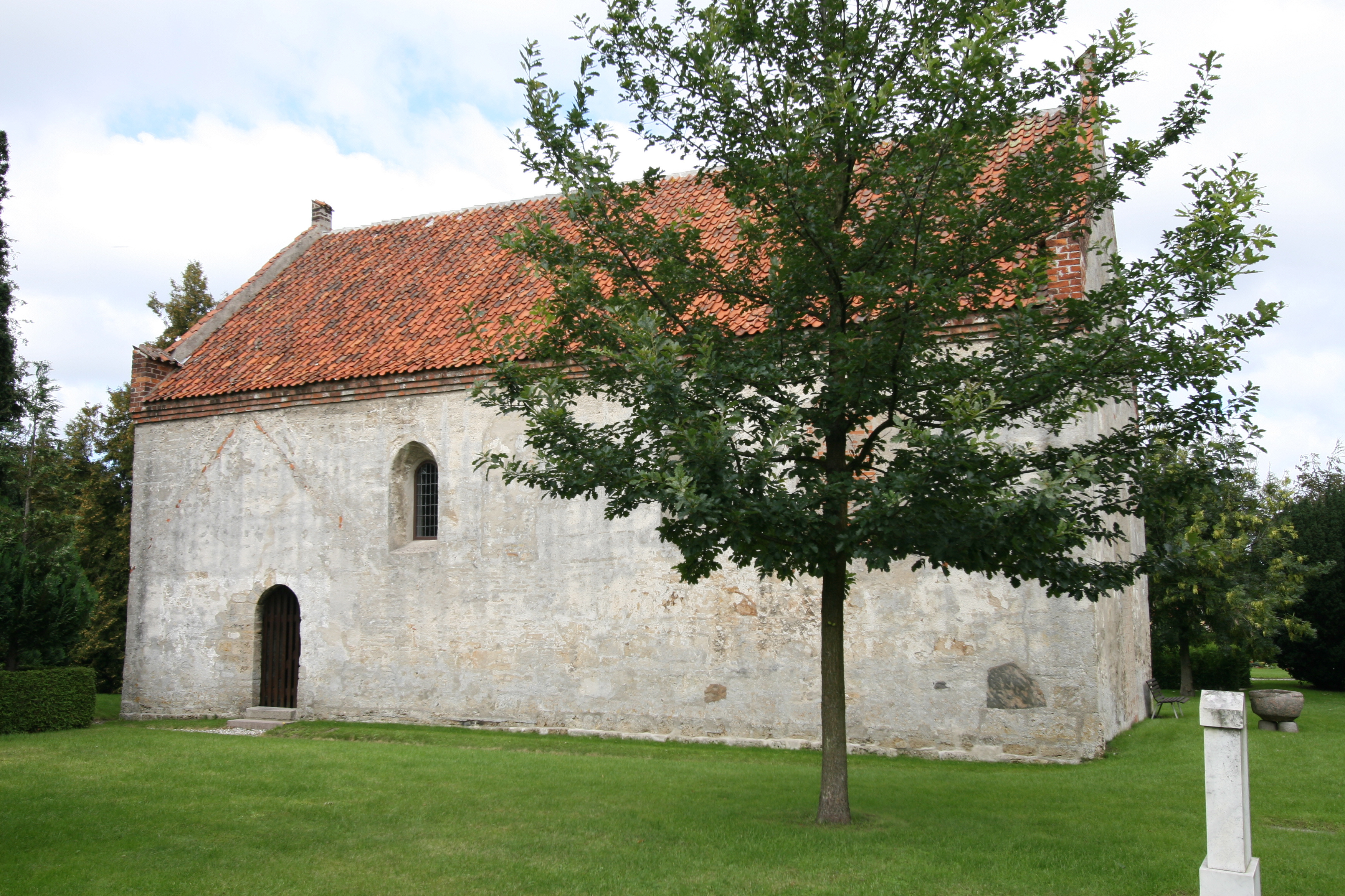 Sankt Ibs Kirke in Roskilde, Denmark. Exterior.